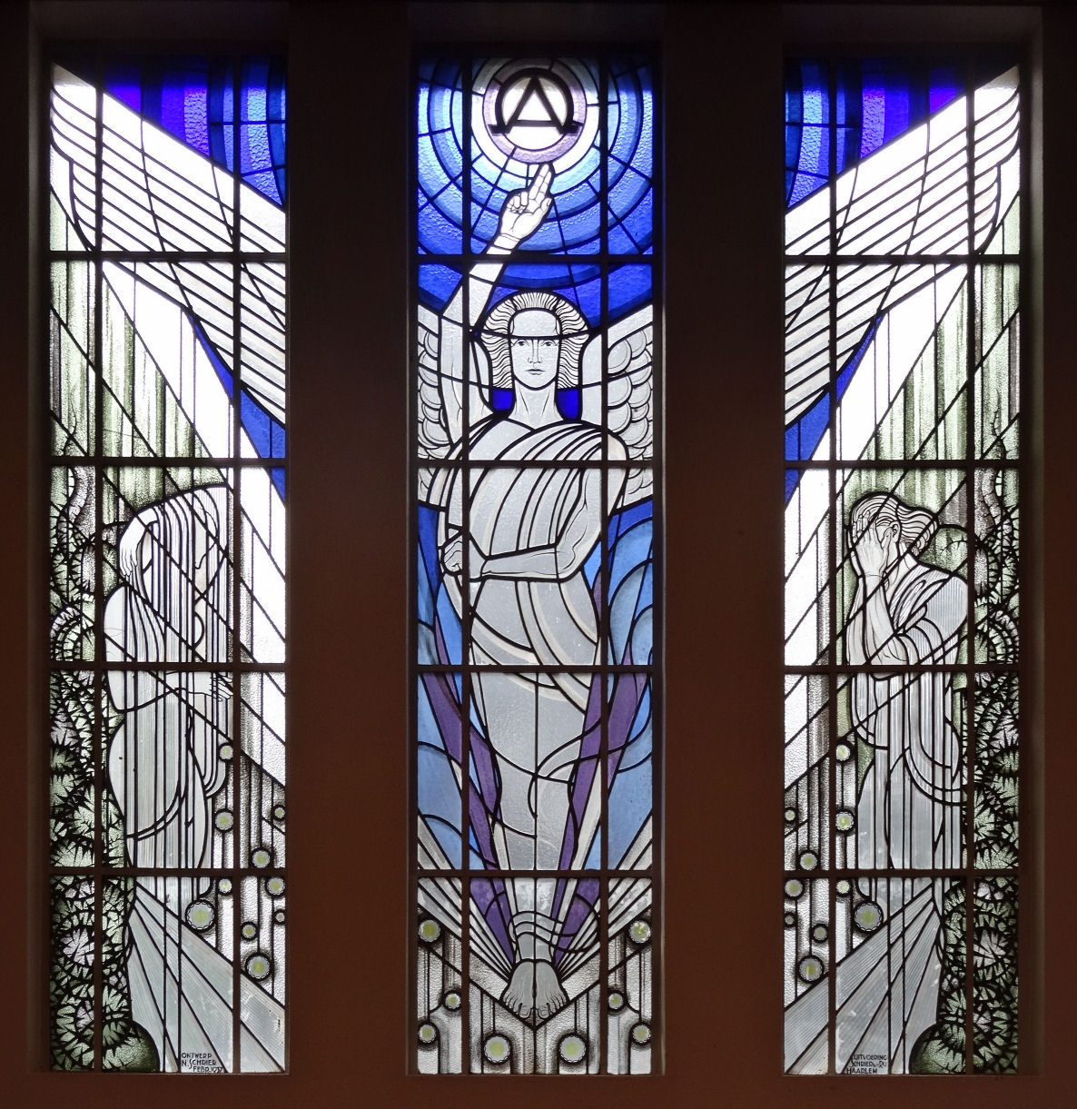 Glas-in-loodraam van een engel (1937) in de aula van de begraafplaats Den en Rust in Bilthoven. Het raam werd ontworpen door Nico Schrier en uitgevoerd in het atelier Schrier en De Ru in Haarlem.